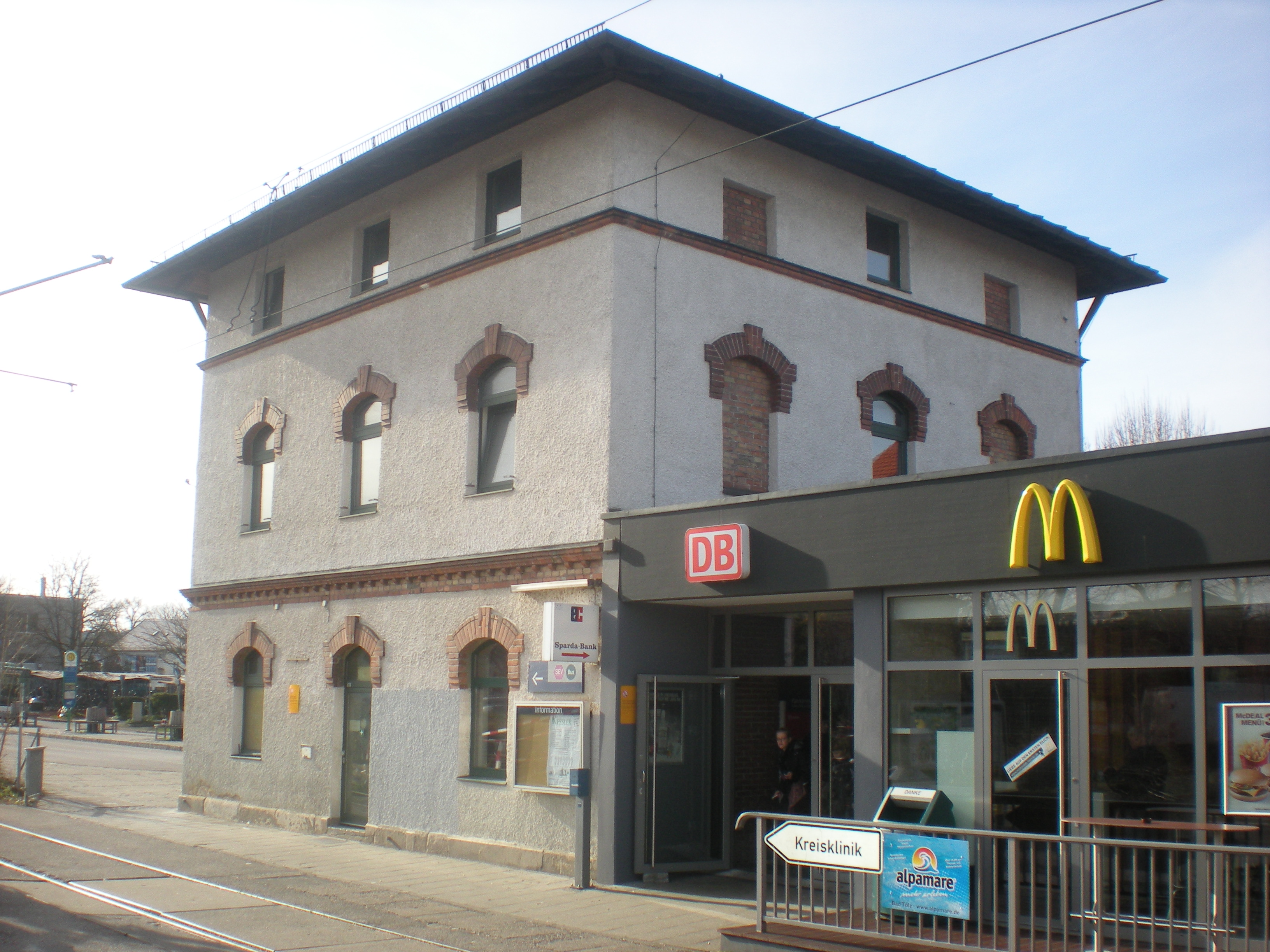 Gleisseite des Empfangsgebäudes des Bahnhofs Wolfratshausen